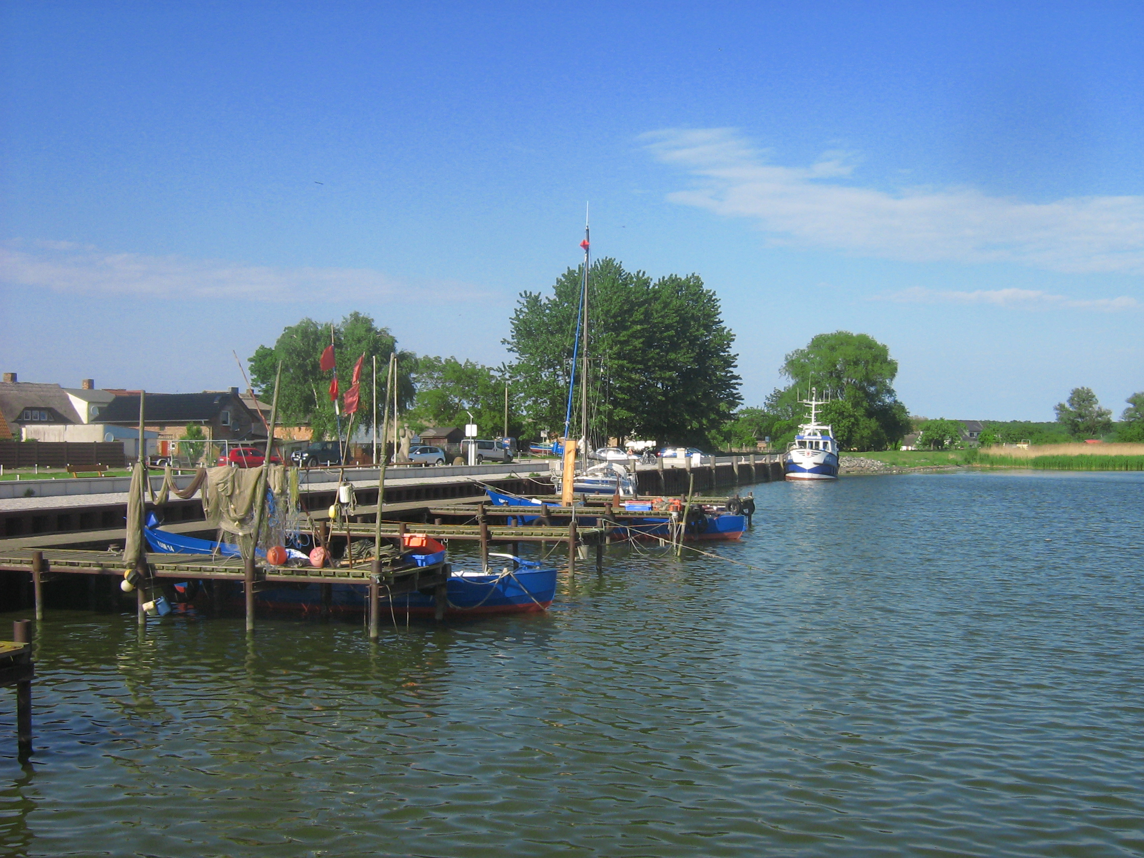 Port w Kamminke